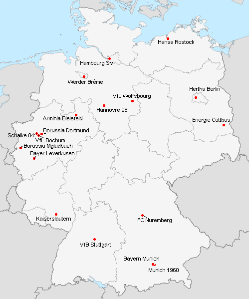 Répartition des clubs en 1.Bundesliga 2002-2003.